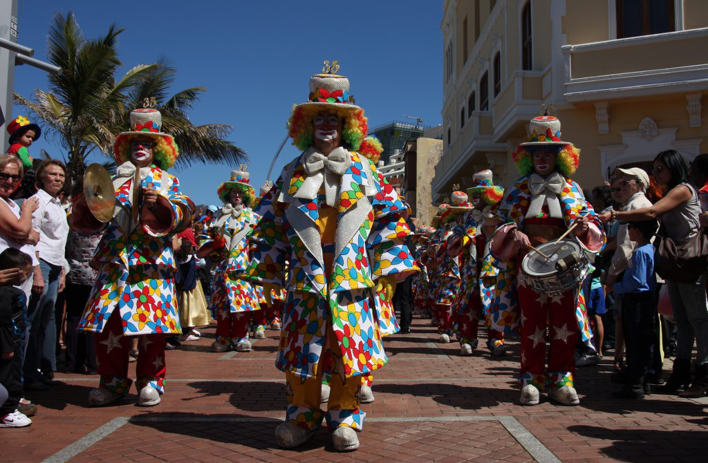 Carnaval del sol, Pasacalles del Carnaval de Las Palmas de Gran Canaria en 2011. Playa de Las Canteras. En Las Palmas de Gran Canaria.